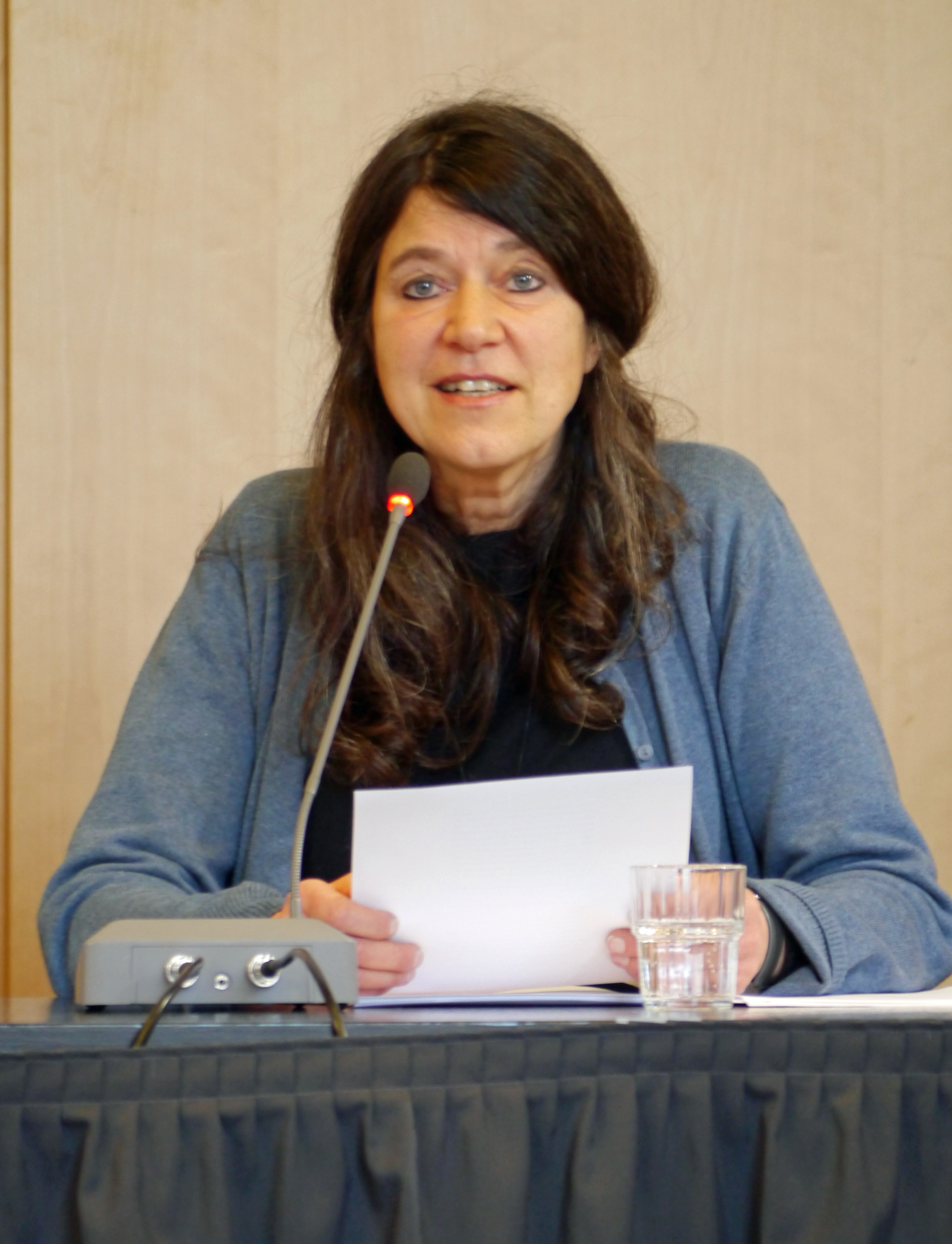 Betty Kolodzy, liest am 18. Februar 2018 aus ihrem Roman Ali, der Tinnitus und ich. Der Lange Tag der Bücher, im Haus am Dom in Frankfurt am Main.